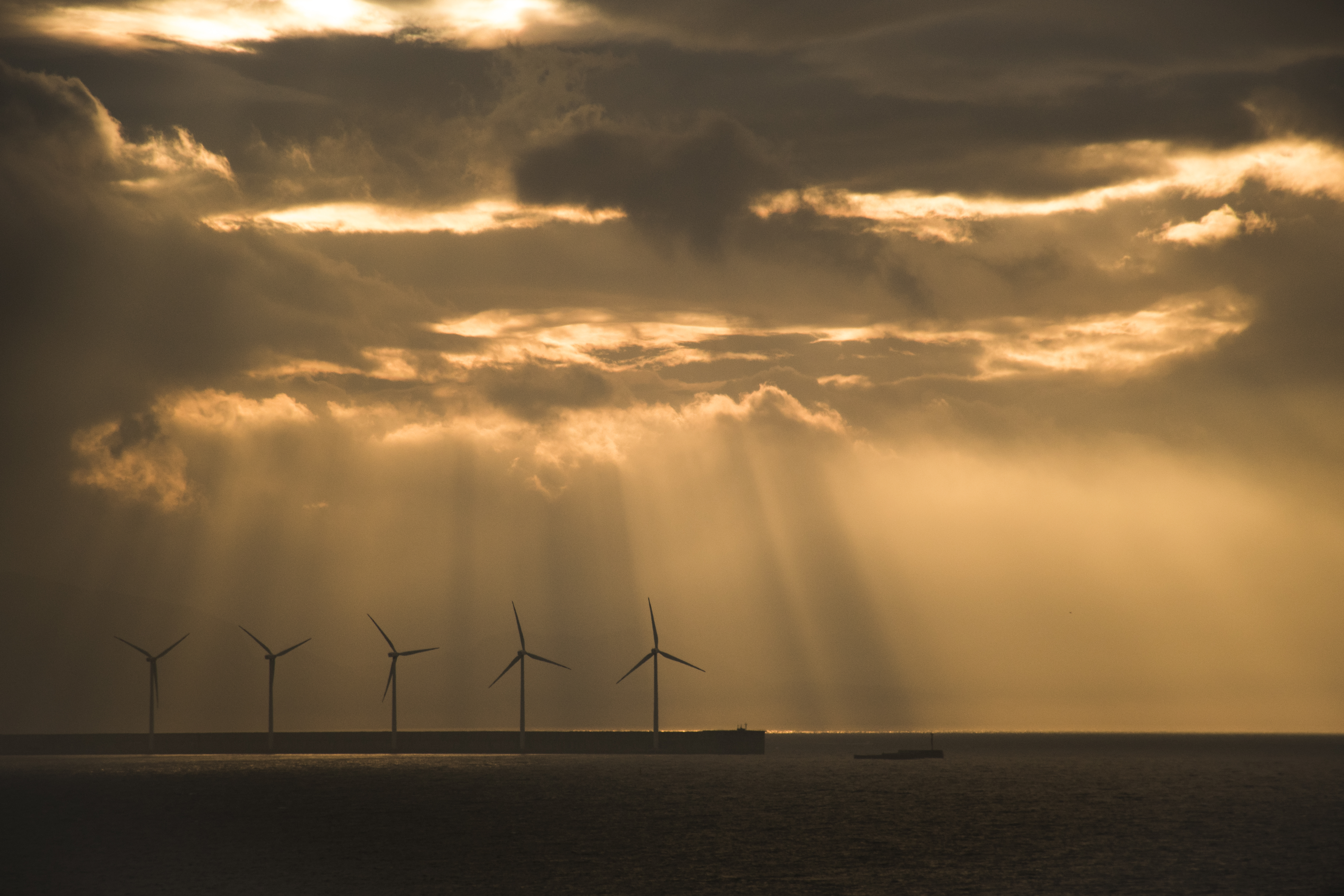 Bilboko superportua eta aire-sorgailuak